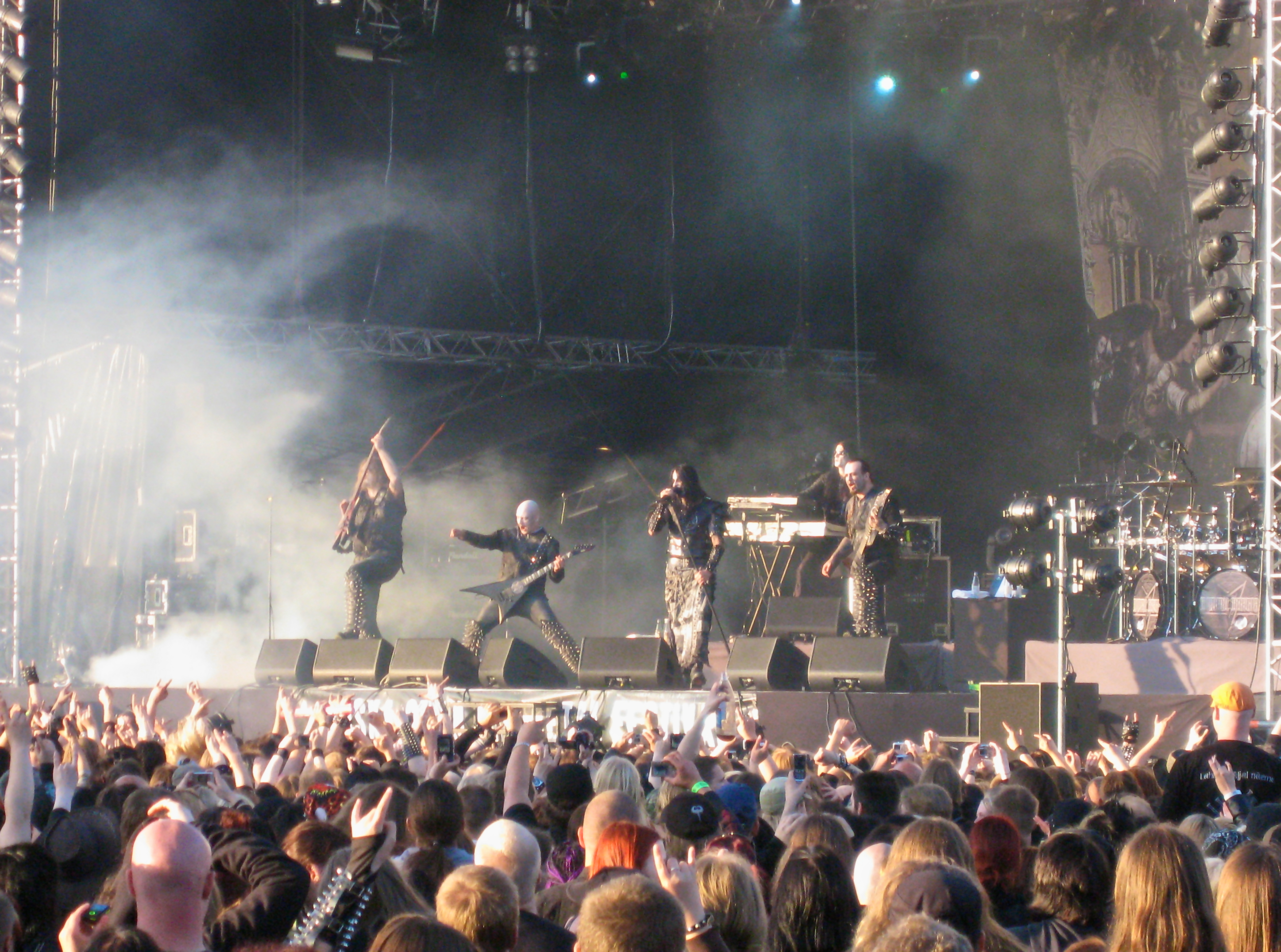 Dimmu Borgir en Tuska Open Air (Helsinki) en 2008